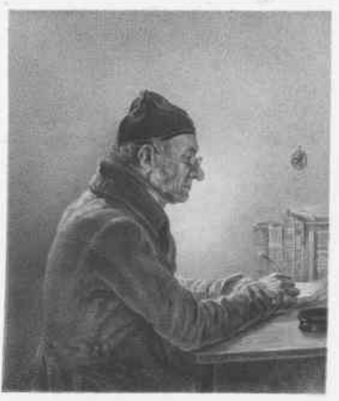 Jakob Gauermann (* 1772 in Öffingen bei Stuttgart; † 27. März 1843 in Miesenbach), deutscher Maler